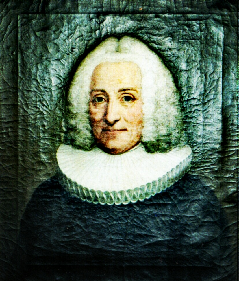 Hinrich Scharbau (1689-1759), Lübecker Pastor und Senior des Predigtamtes